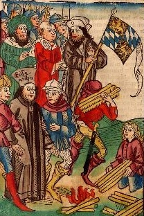 Kurfürst Ludwig III. von der Pfalz (mit Standarte) überwacht die Hinrichtung des Hieronymus von Prag auf dem Konzil zu Konstanz